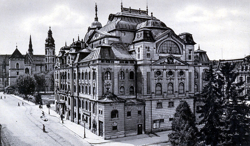 Divadlo Kosice 1900